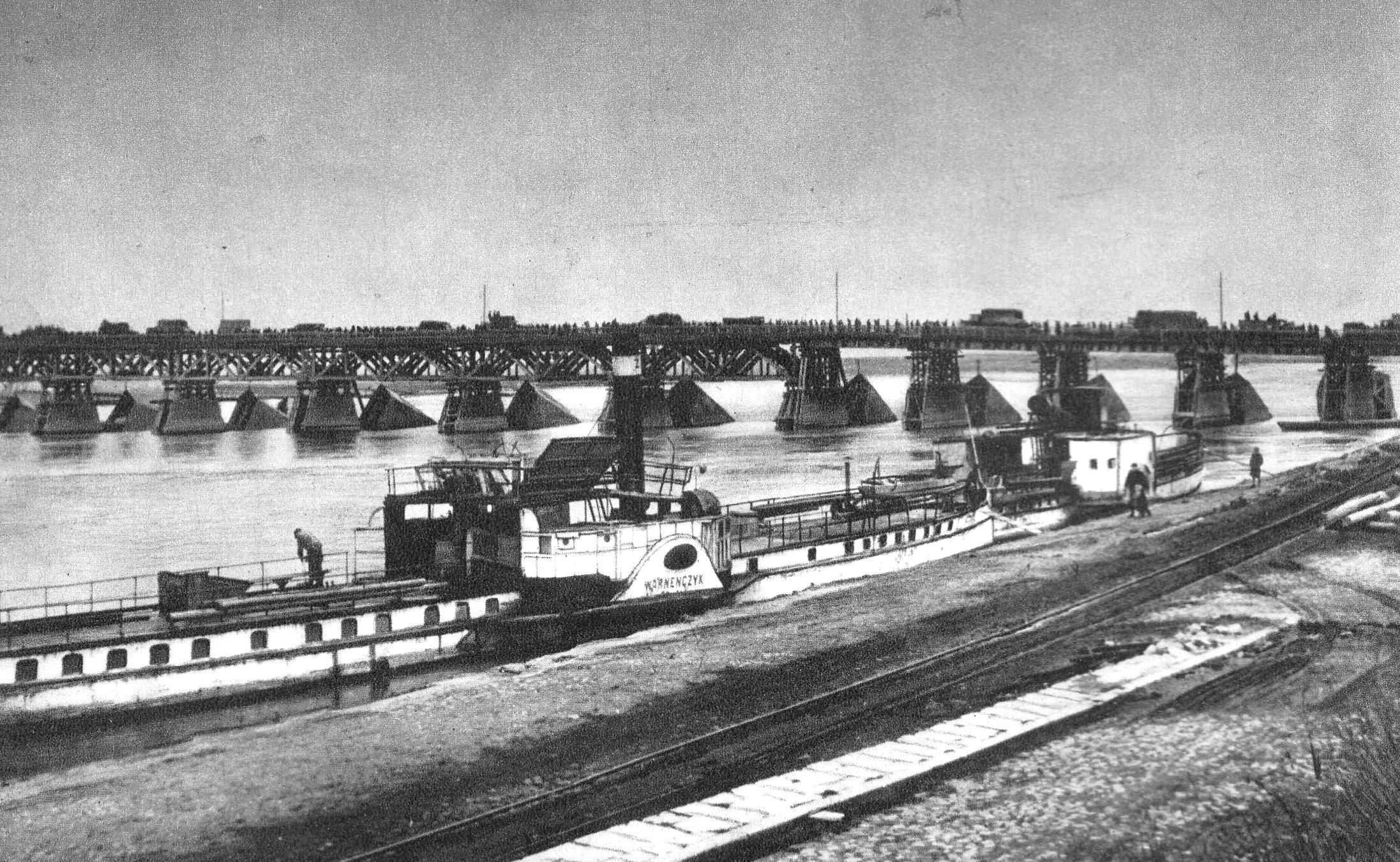 Most wysokowodny na Wiśle w Warszawie